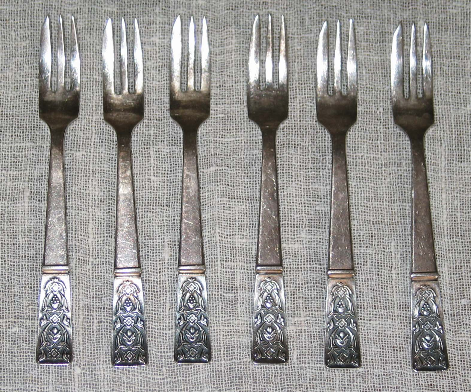 Tallinna Juveelitehases 1960. aastail valmistatud rahvuslikud koogikahvlid